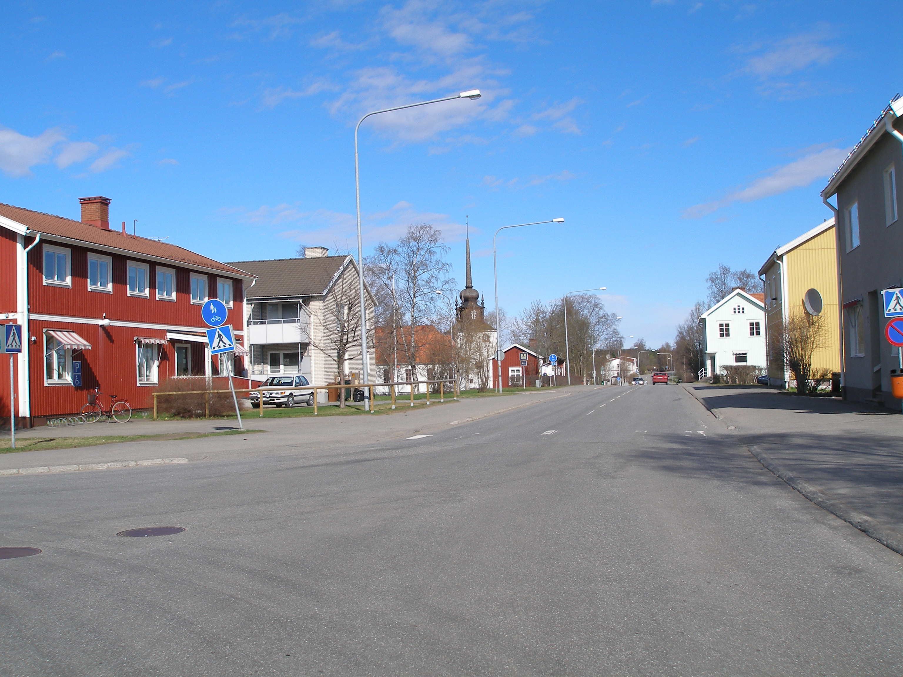 Storgatan i Kåge, Skellefteå kommun. Vy mot norr med kyrkan i bakgrunden.